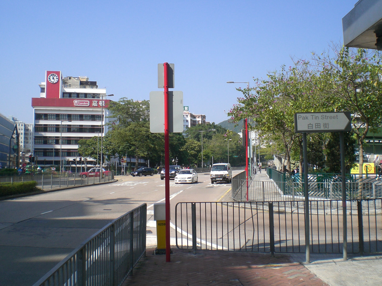 嘉頓烘焙中心大埔道